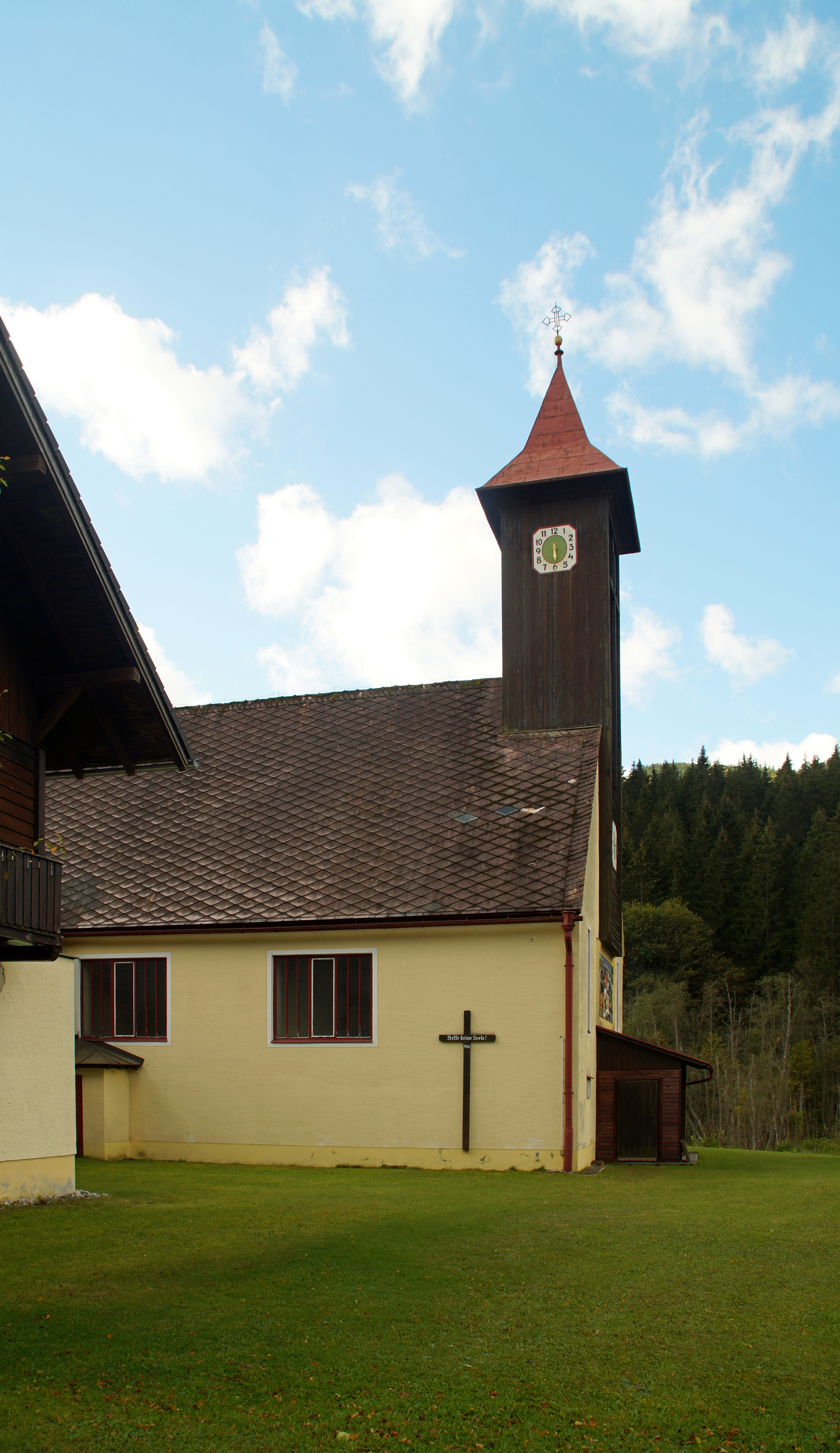 Die Klemenskirche in Frein an der Mürz, Gemeinde Neuberg an der Mürz, Steiermark